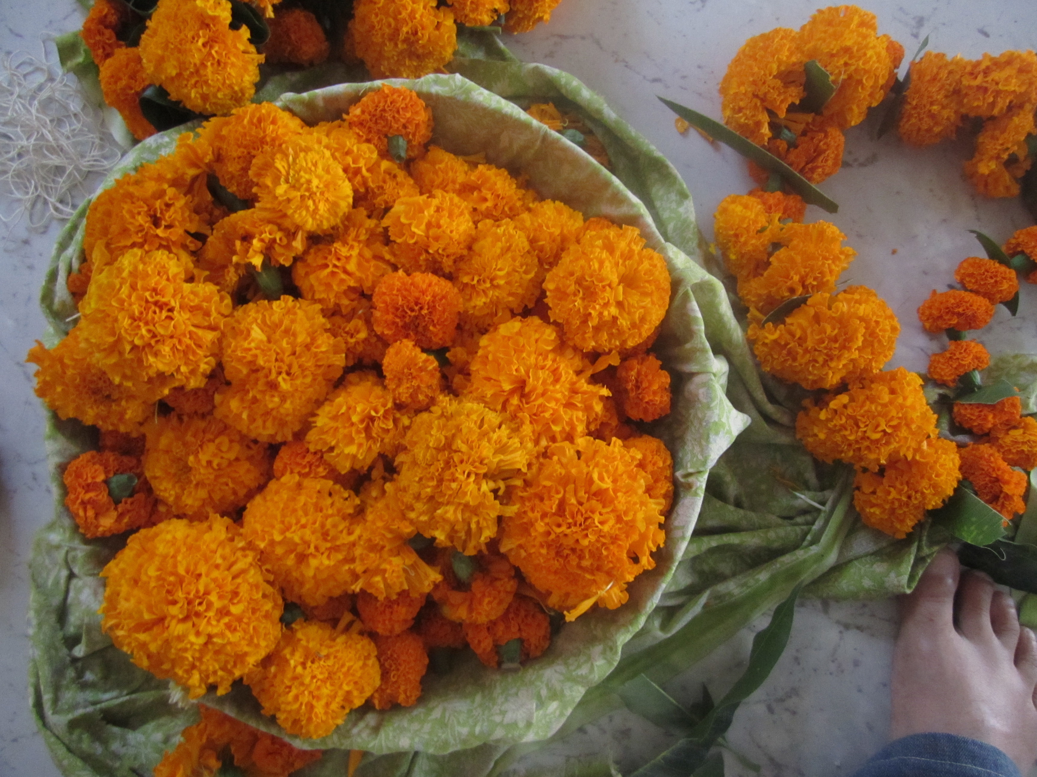 Flower Garlands for Dipavali garnishing